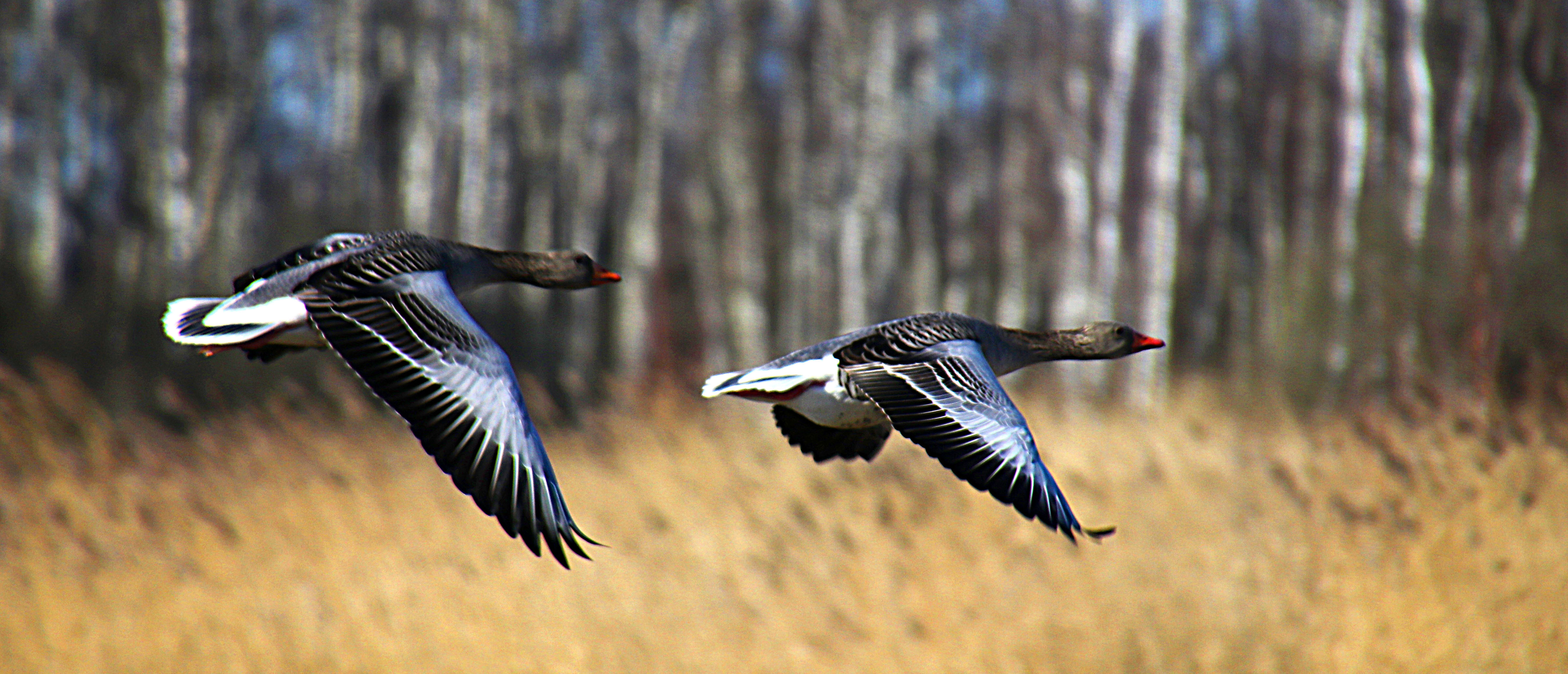 Kalvebod Fælled. Vandring i reservatet.